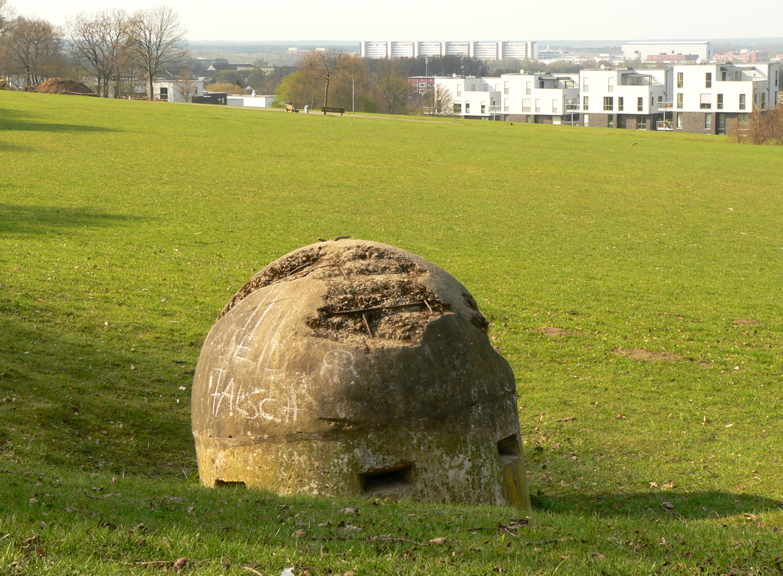 Einmann-Bunker auf dem Klieversberg in Wolfsburg